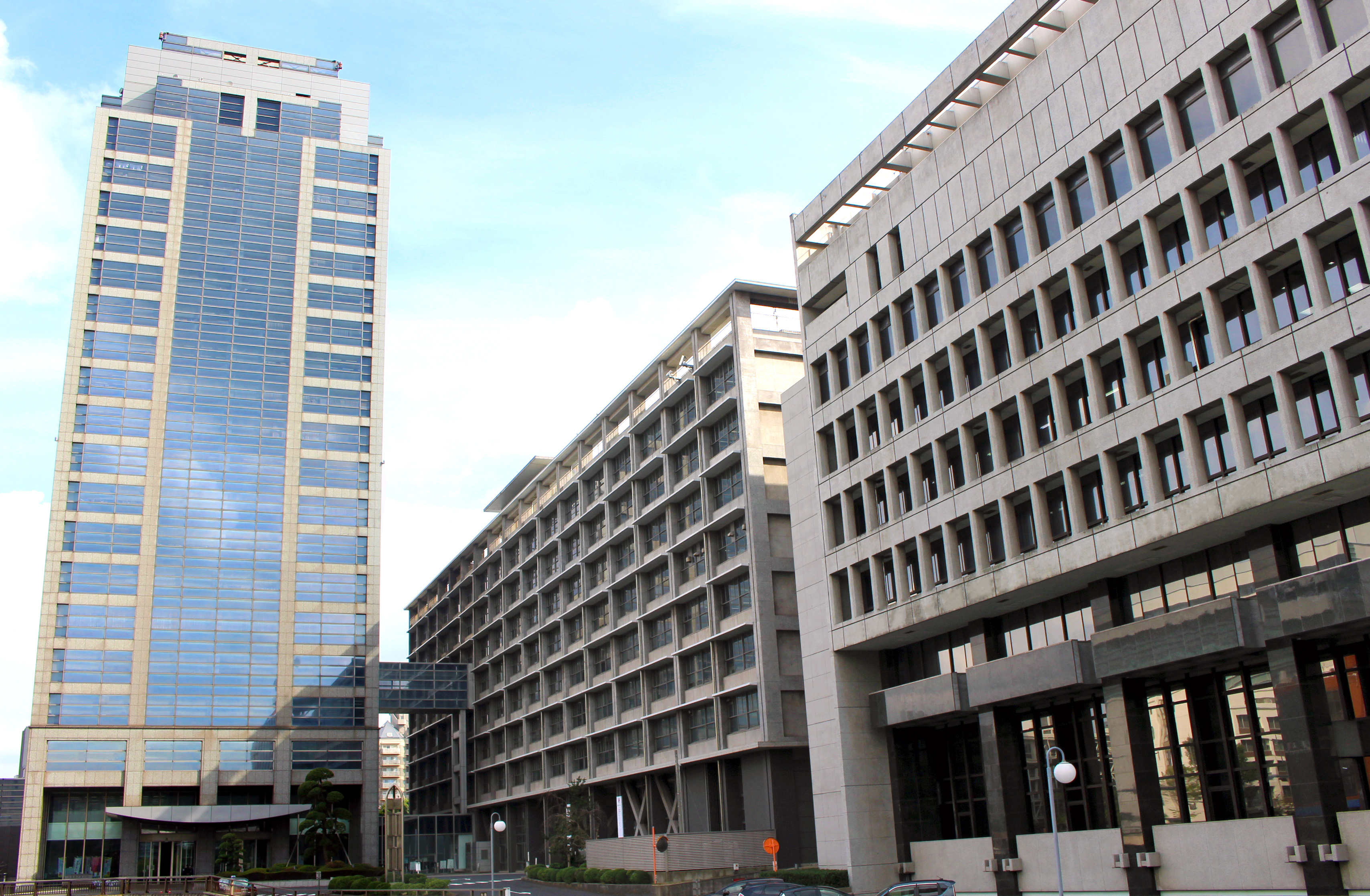 千葉県庁舎（Chiba Prefectural Office Building）本庁舎前